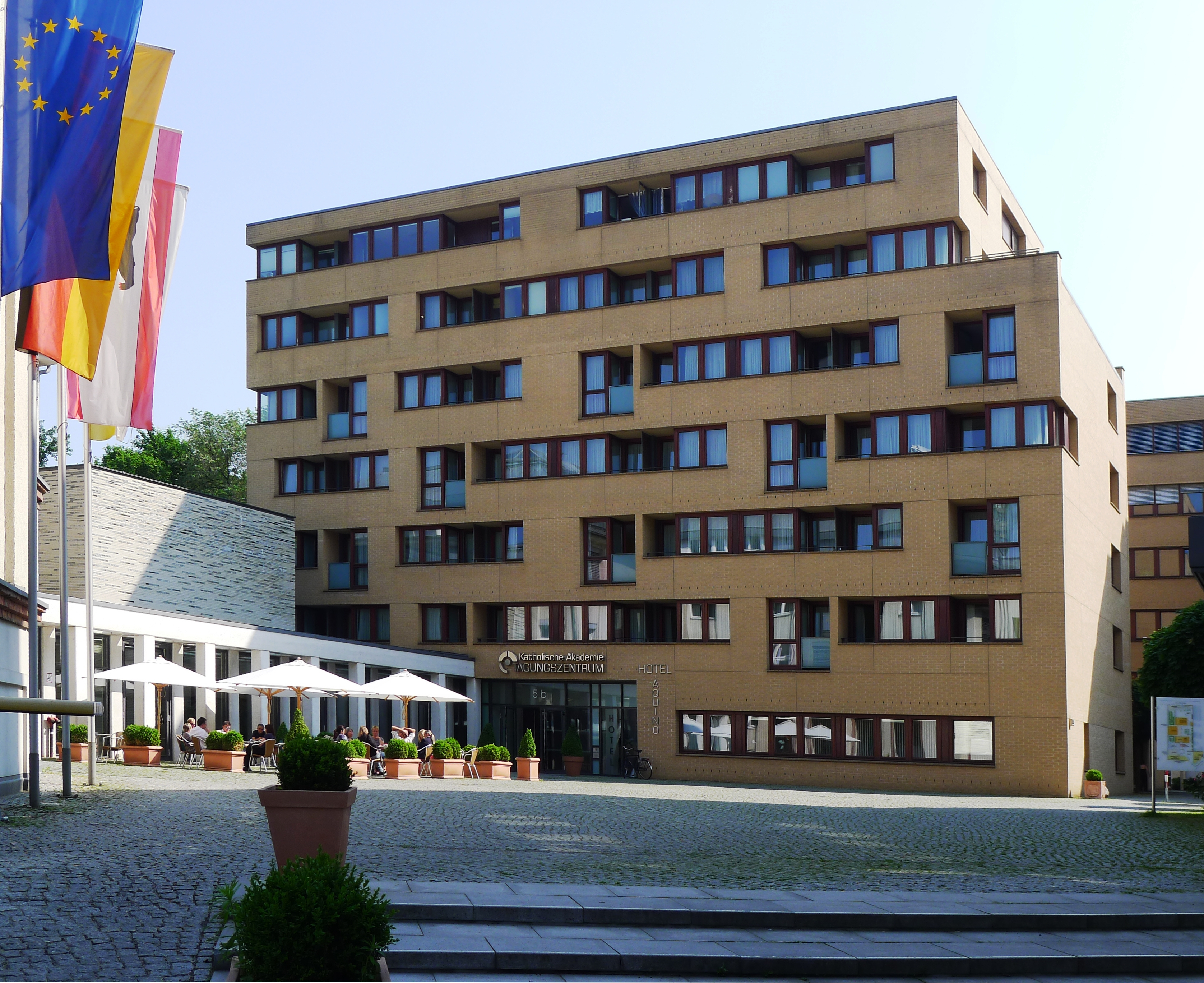 Hotel des Katholischen Zentrums